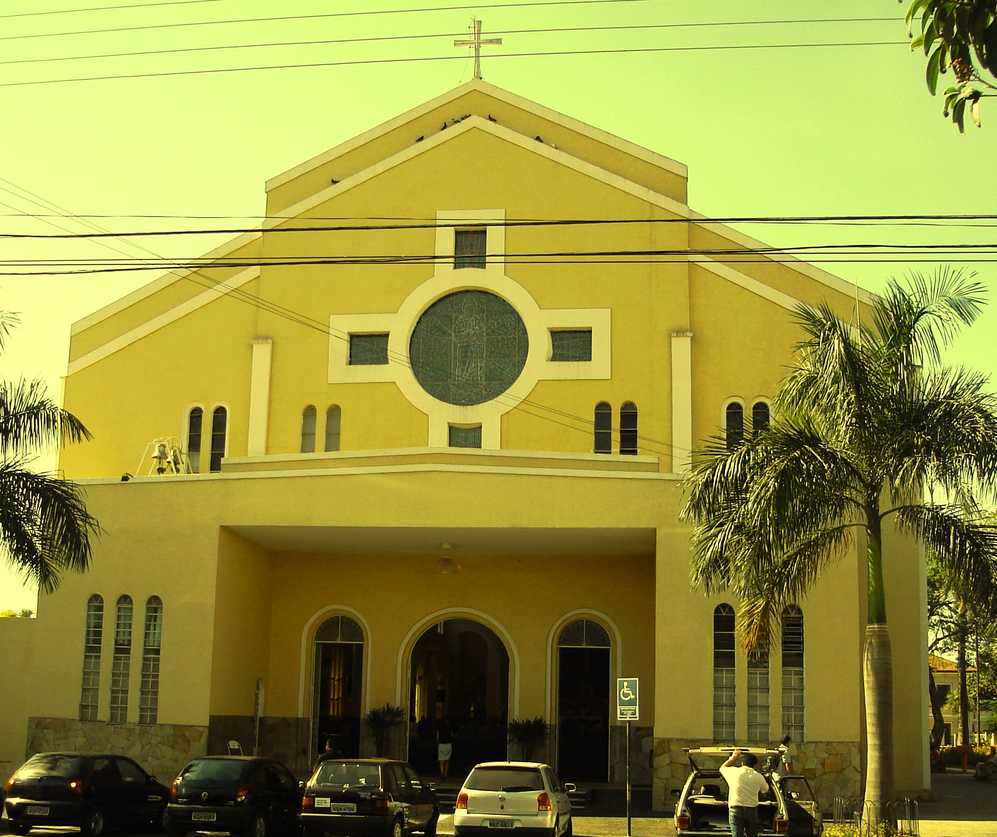 Fachada da Igreja Matriz do bairro de Campinas, Goiânia, Brasil.